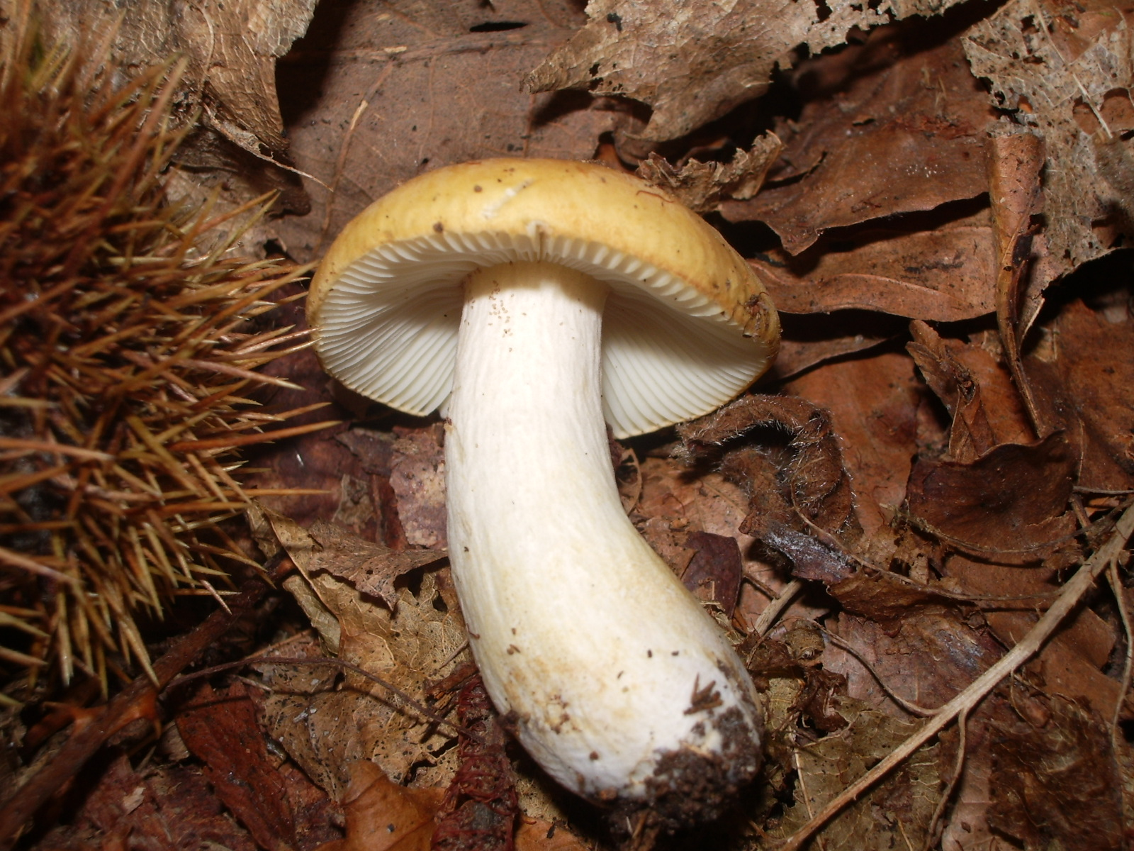 Russula ochroleuca près d'une châtaigne